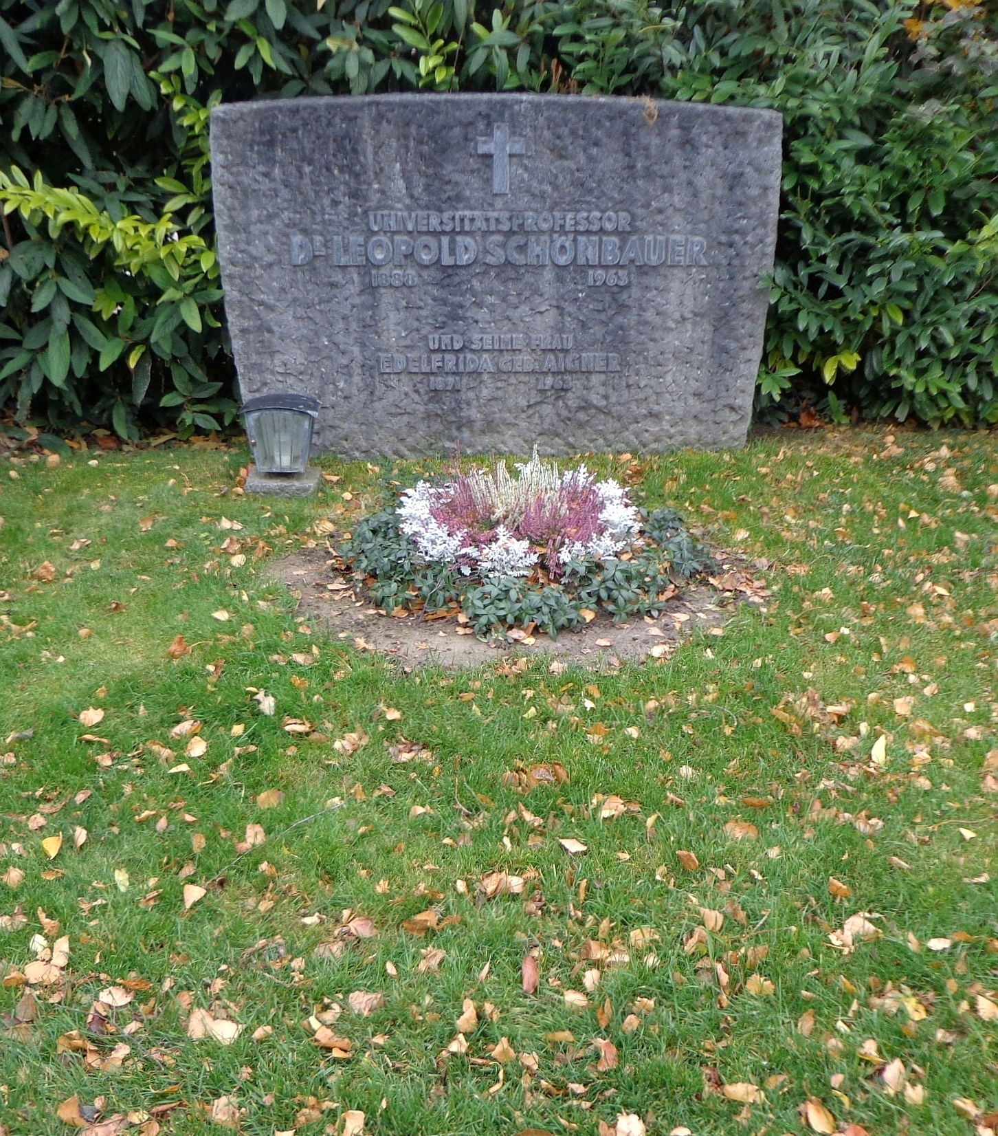 Wiener Zentralfriedhof - Gruppe 32 C - Ehrengrab von Leopold Schönbauer